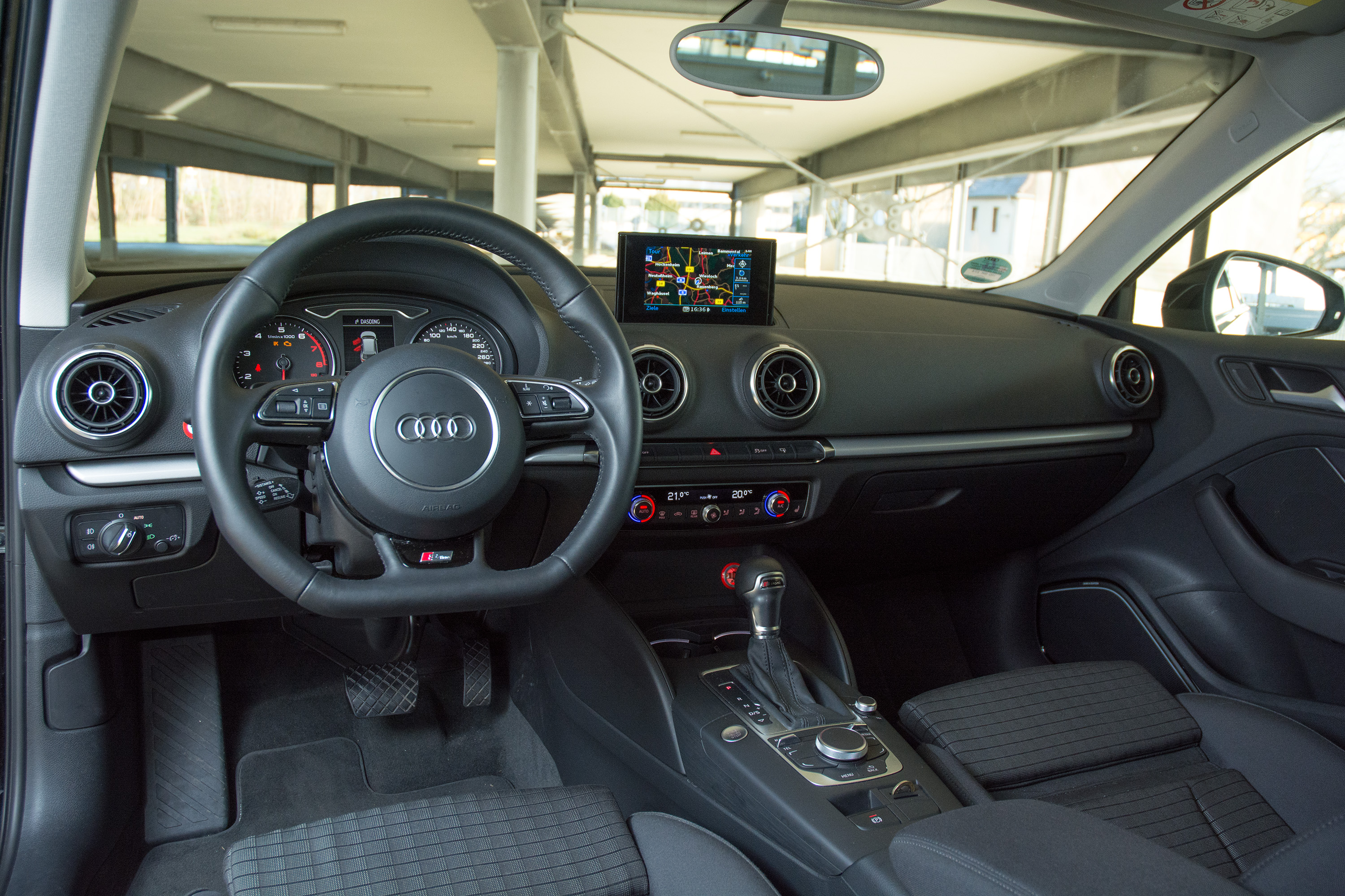 Audi A3 Sportback Ambition Interieur mit S tronic Getriebe